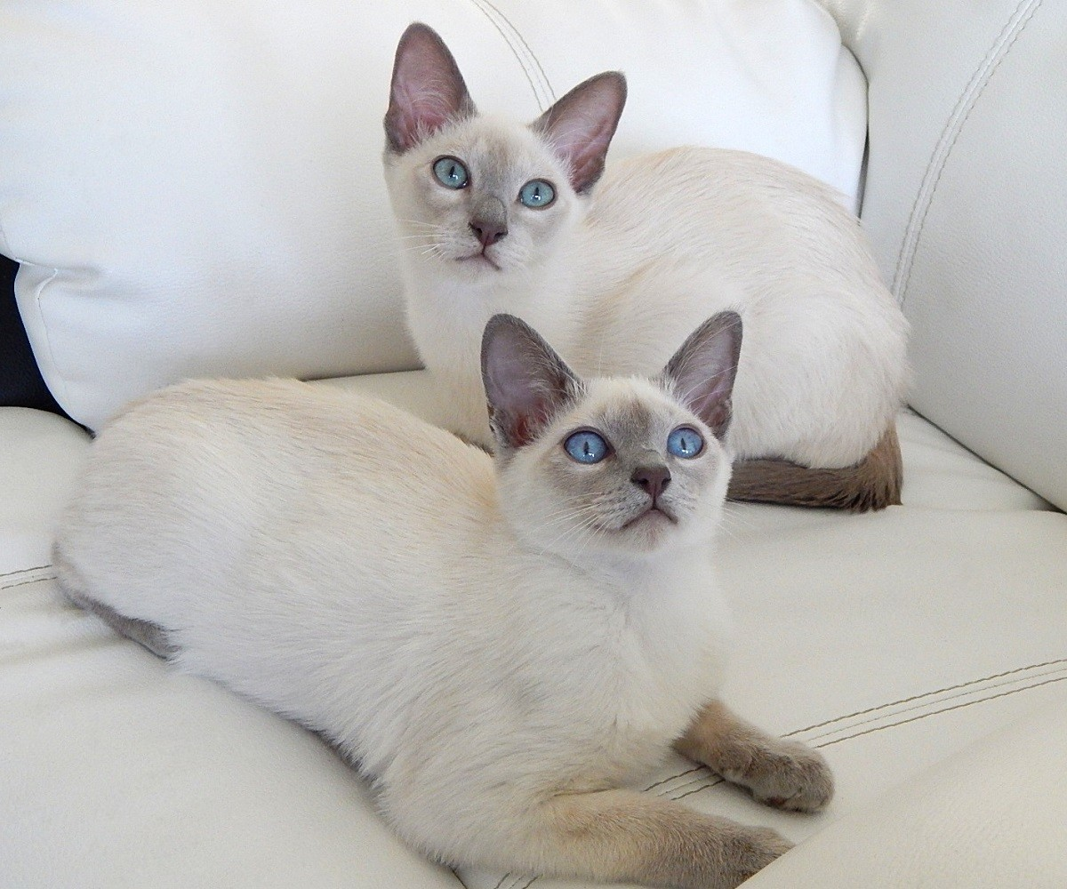 Chatons tonkinois poil court lilac mink (derrière) et lilac point (devant)